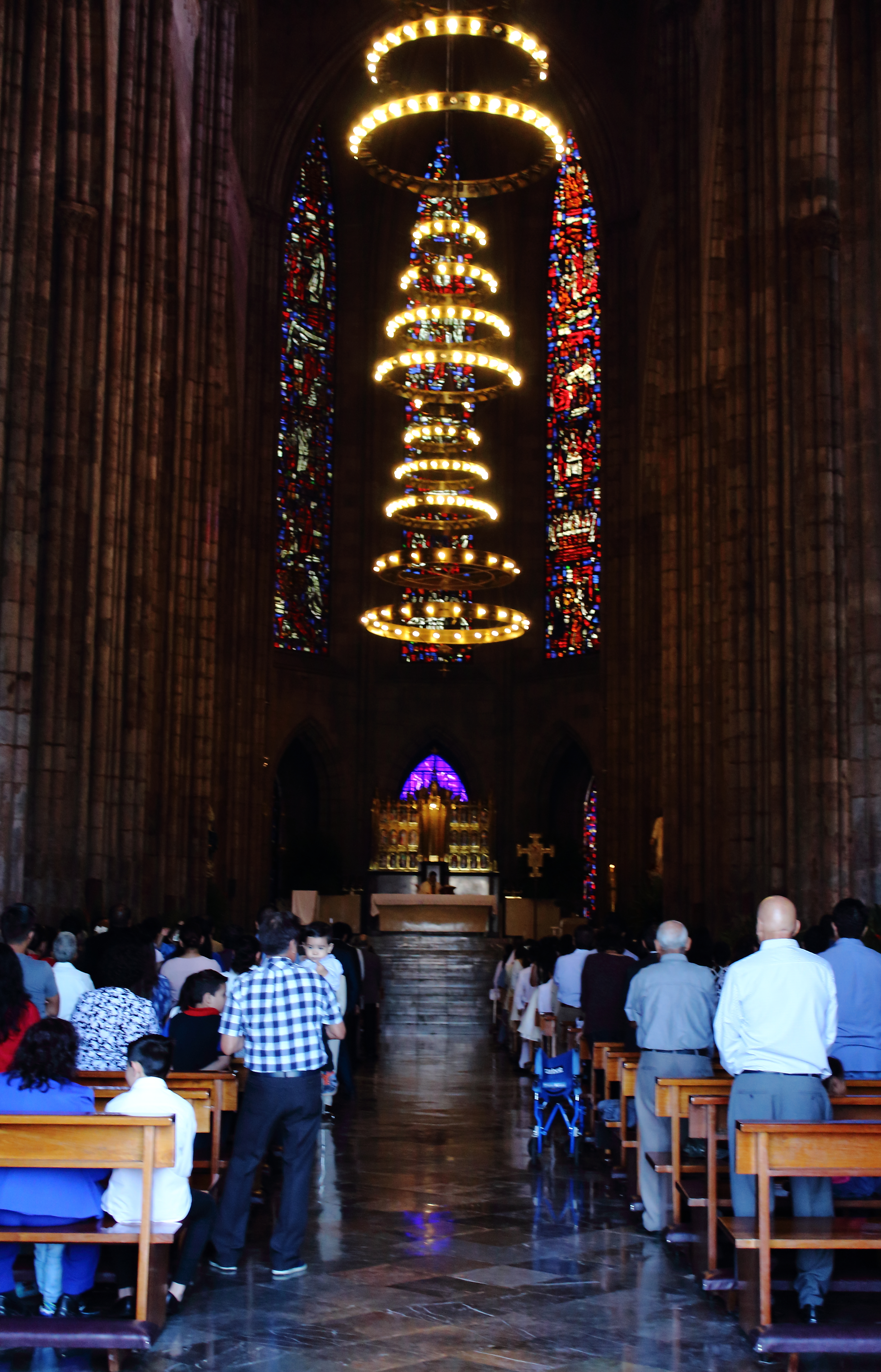 Interior del Templo Expiatorio del Santísimo Sacramento ubicado en Guadalajara, Jalisco, México.